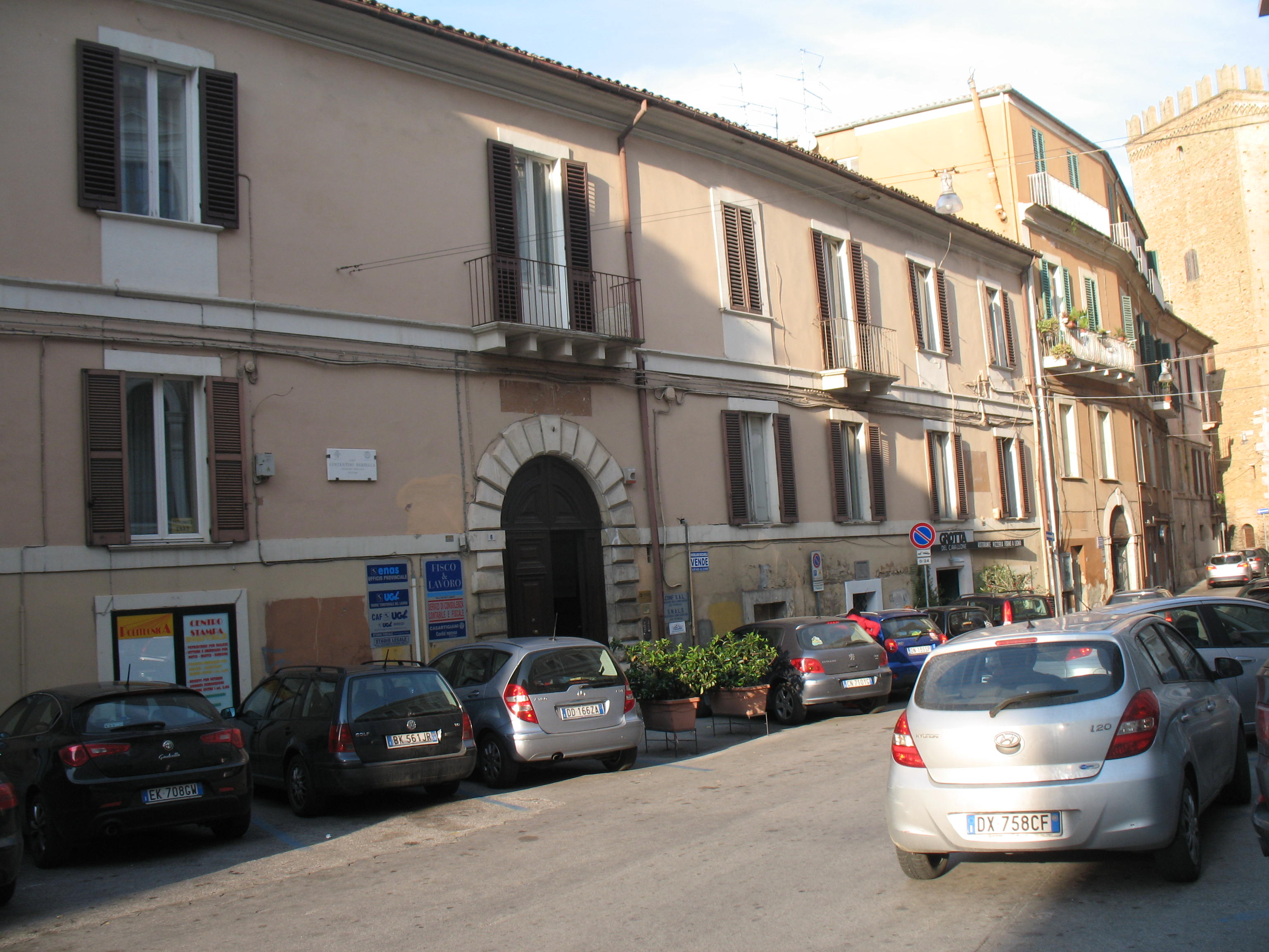 Il Palazzo Durini fu edificato nella prima metà del Settecento dall'omonima famiglia. Nella foto è anche visibile la torre del Palazzo Arcivescovile edificata nel 1470